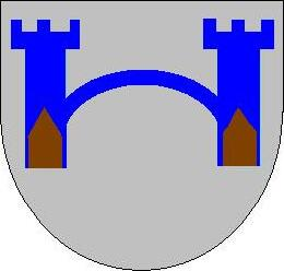 blasón de fantasía